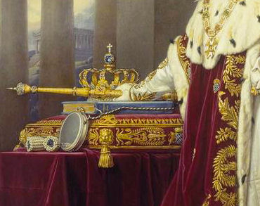 Detail